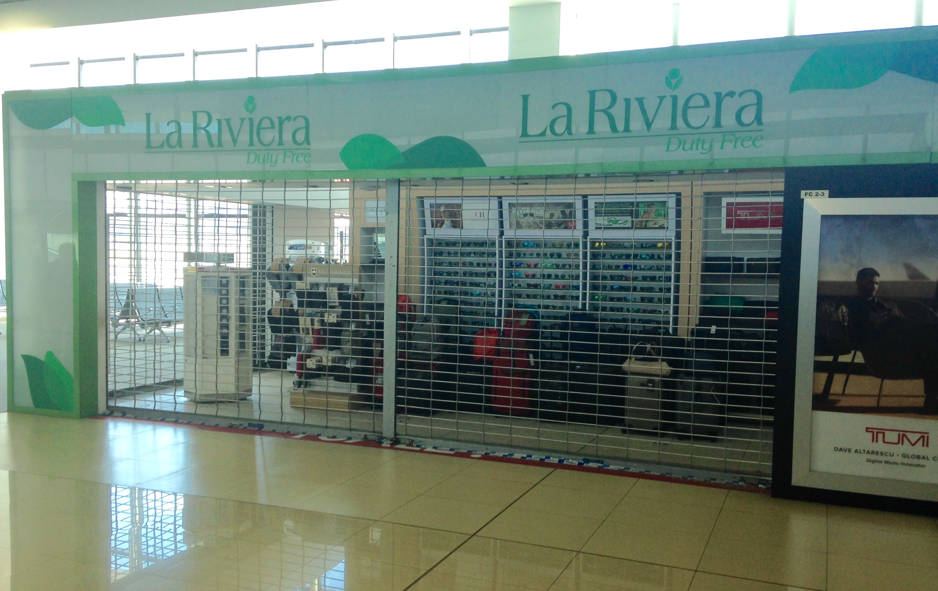 Tiendas "La Riviera" cerradas por el Ministerio Público guatemalteco en las instalaciones del Aeropuerto Internacional La Aurora.